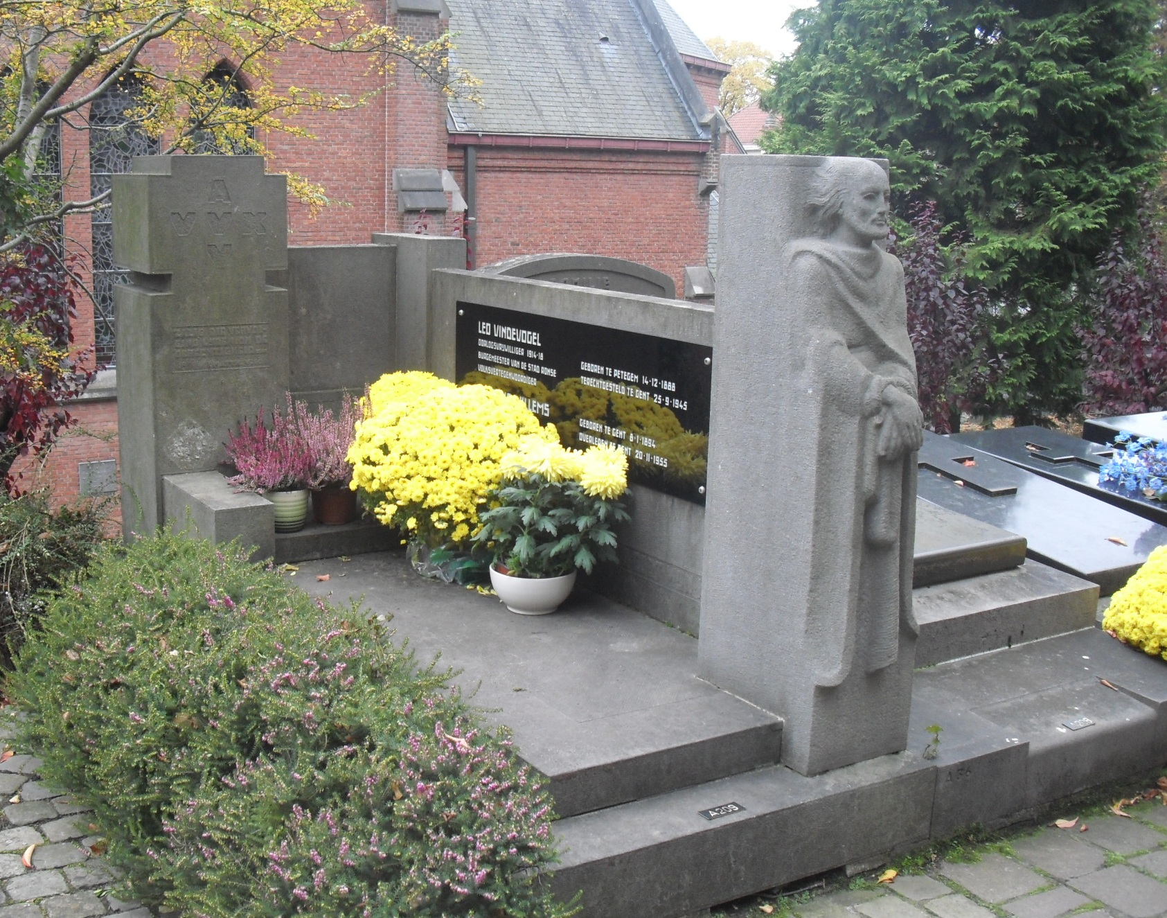 Graf van Leo Vindevogel - Campo Santo - Sint-Amandsberg - Gent - Oost-Vlaanderen - België